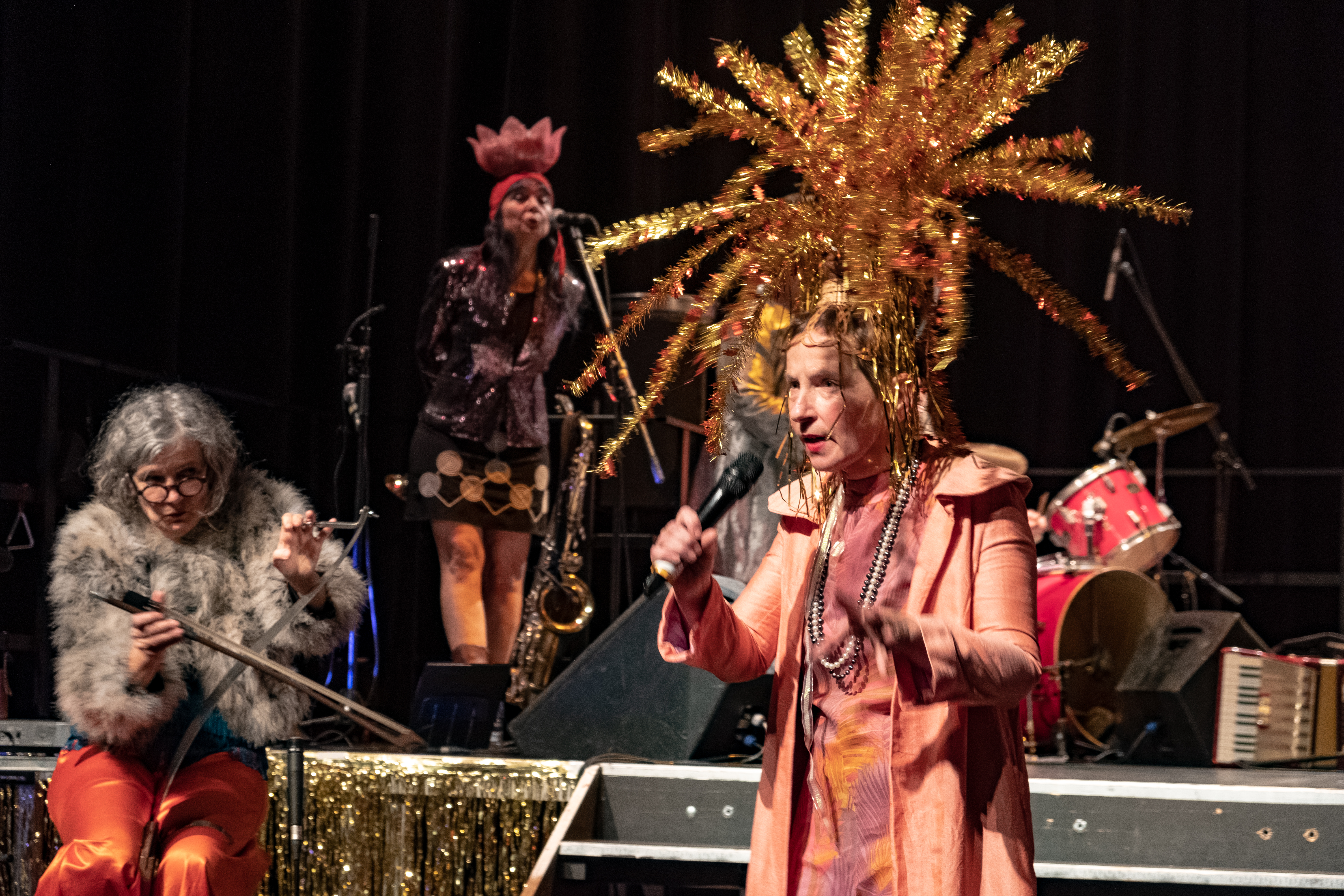 Dorothea Schürch, Michele Fuchs und Chris Regn in der Show «Let's sing Arbeiterin*» von Les Reines Prochaines und Freundinnen*, 2019